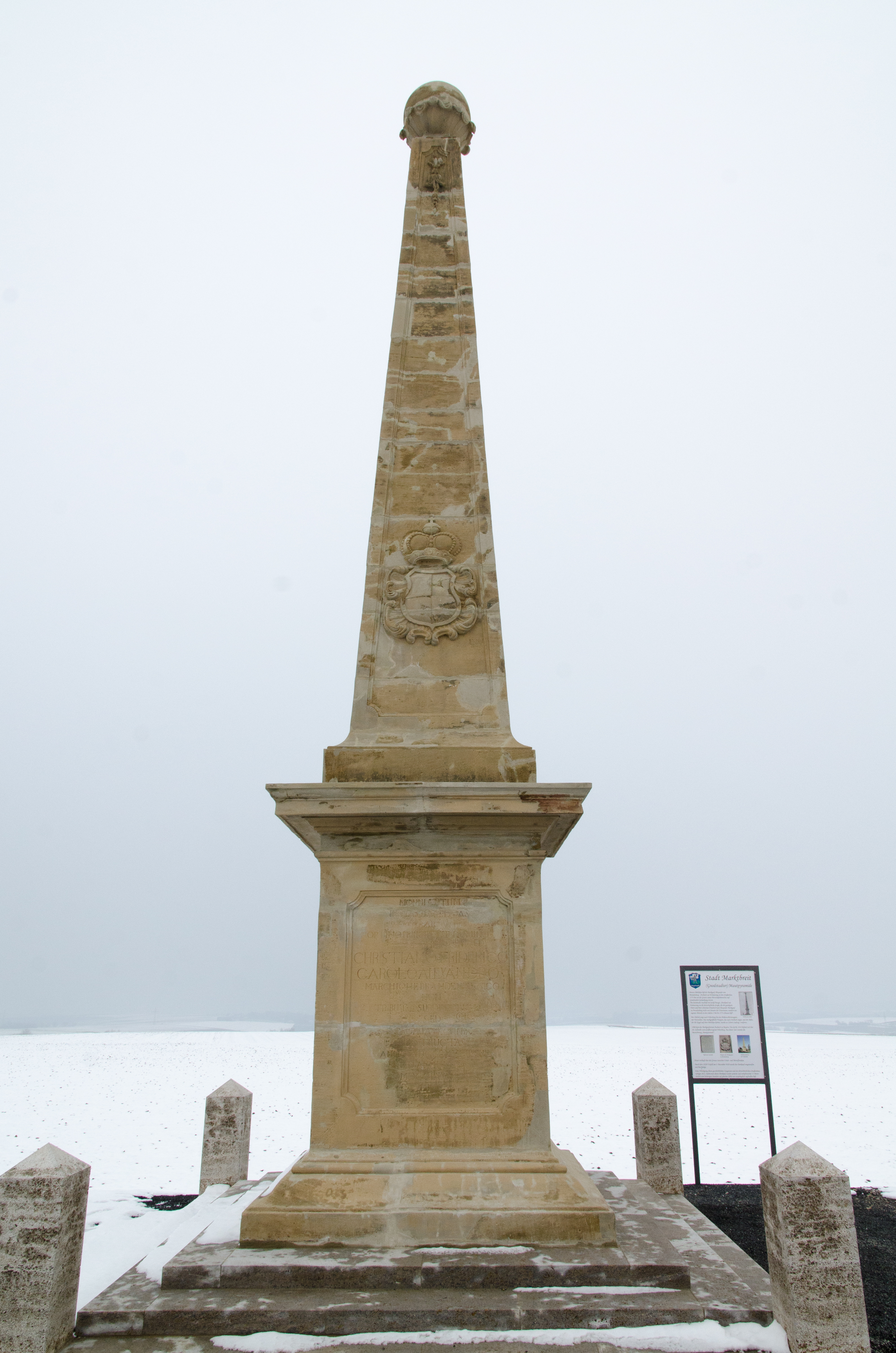 Mautpyramide an der B13 zwischen Ochsenfurt und Oberickelsheim von Markgraf Christian Friedrich Karl Alexander, 1773